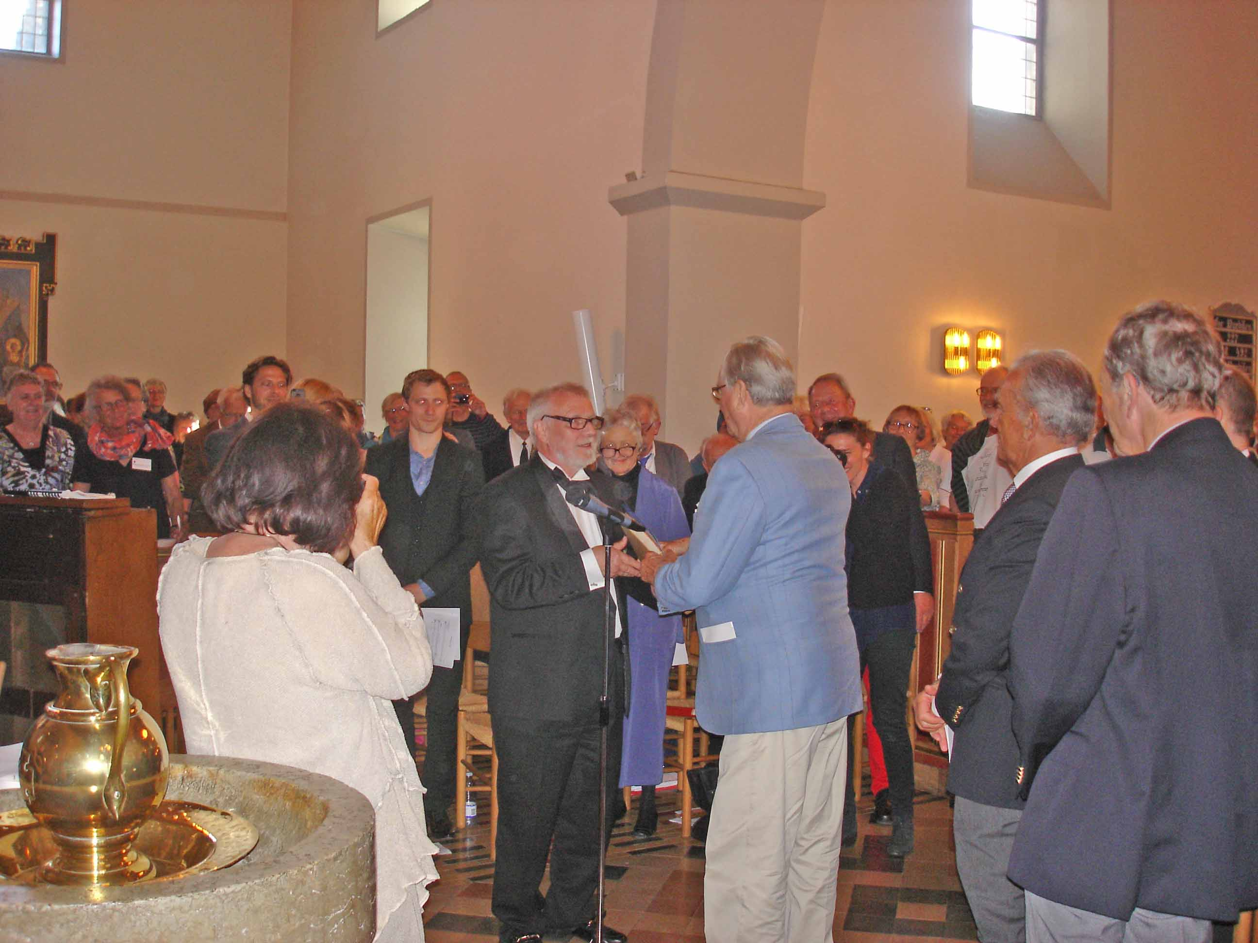 Præsidenten for KulturBornholm, Carsten Seeger, overrækker æreskunstnerdiplomet til Prinsgemalen